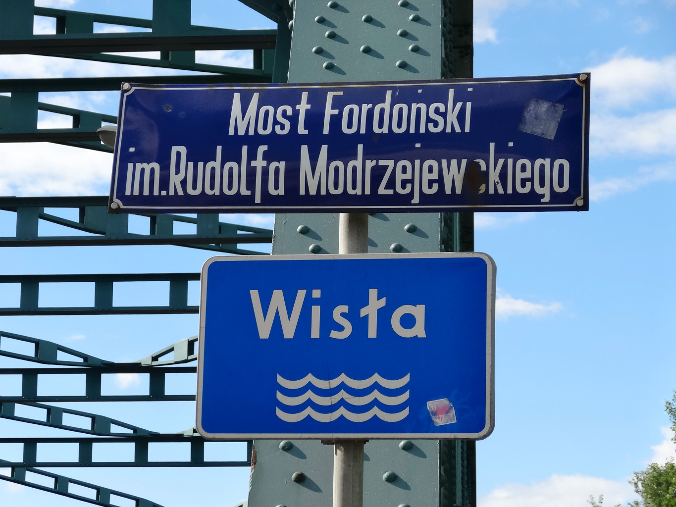 Most fordoński im. Rudolfa Modrzejewskiego nad Wisłą w Bydgoszczy-Fordonie